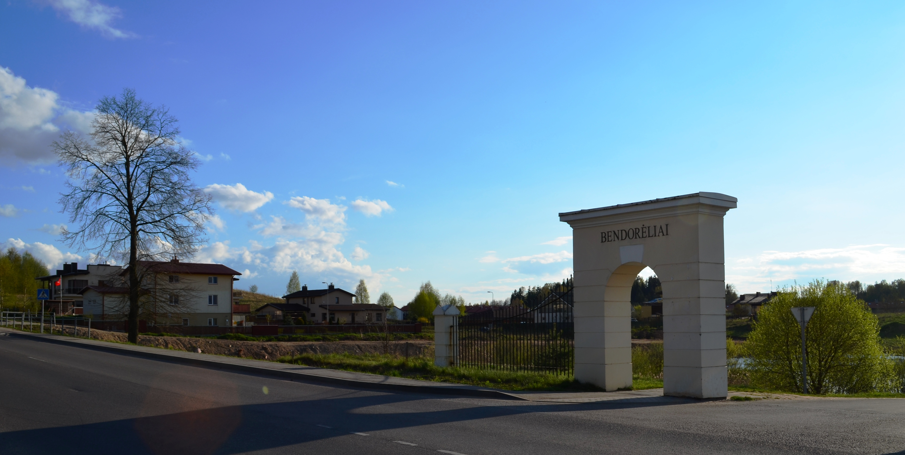 Bendorėliai (Bendoriai), Vilniaus raj.